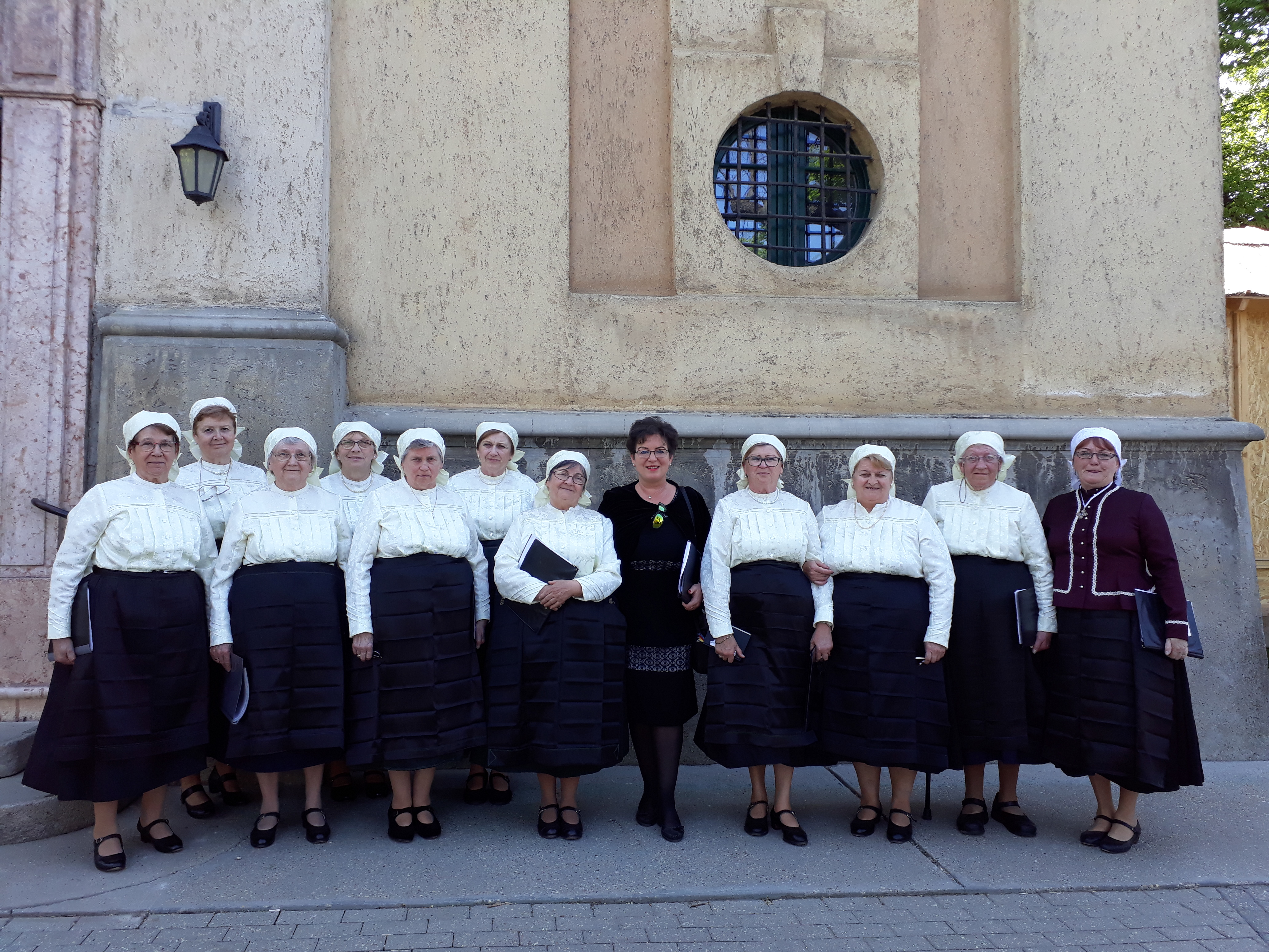 A Kitelepítési Emléknapon hagyományosan az Asszonykórus szolgál a misén. A fotó a mise után, a Kegytemplom előtt készült.